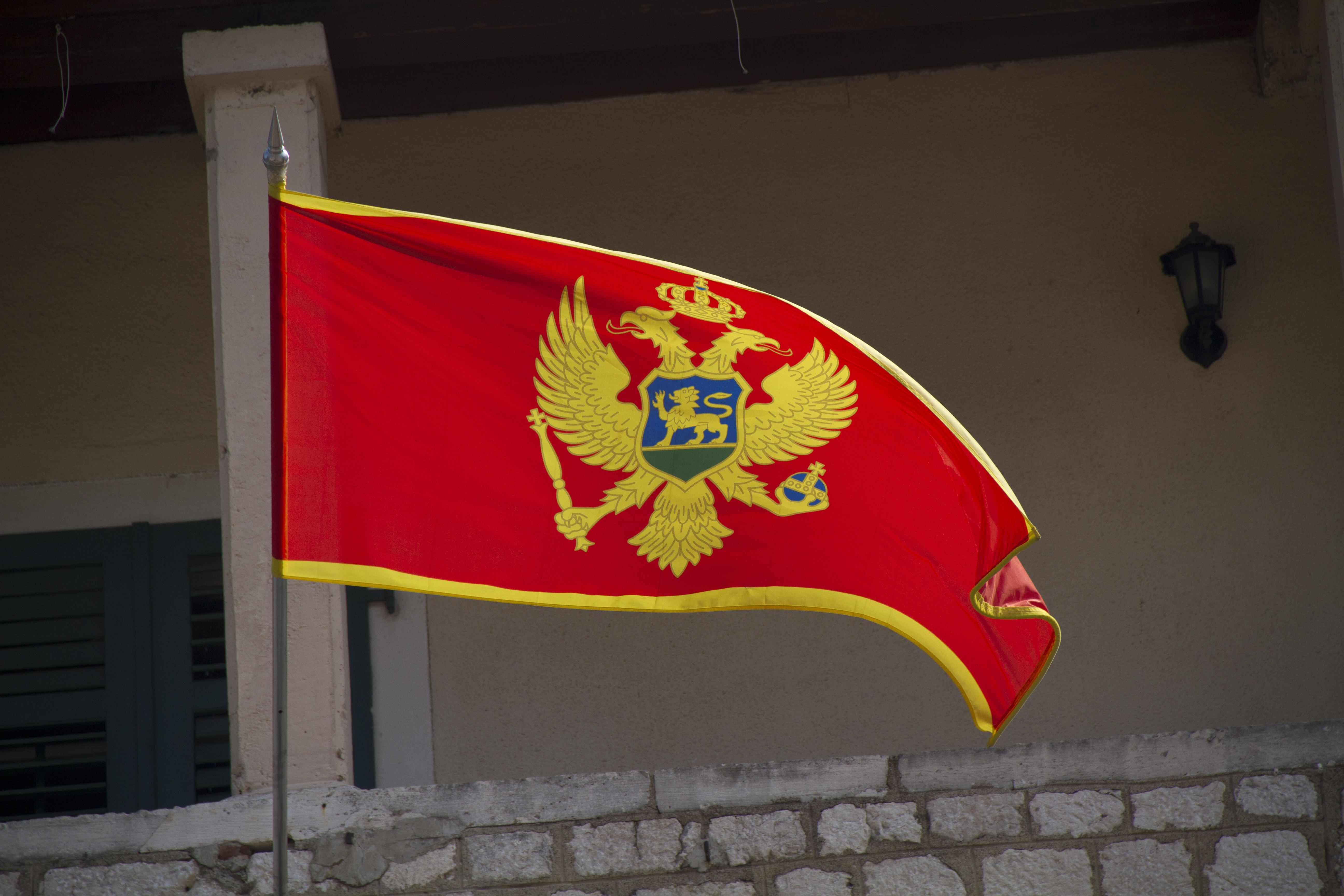 Montenegro's flag